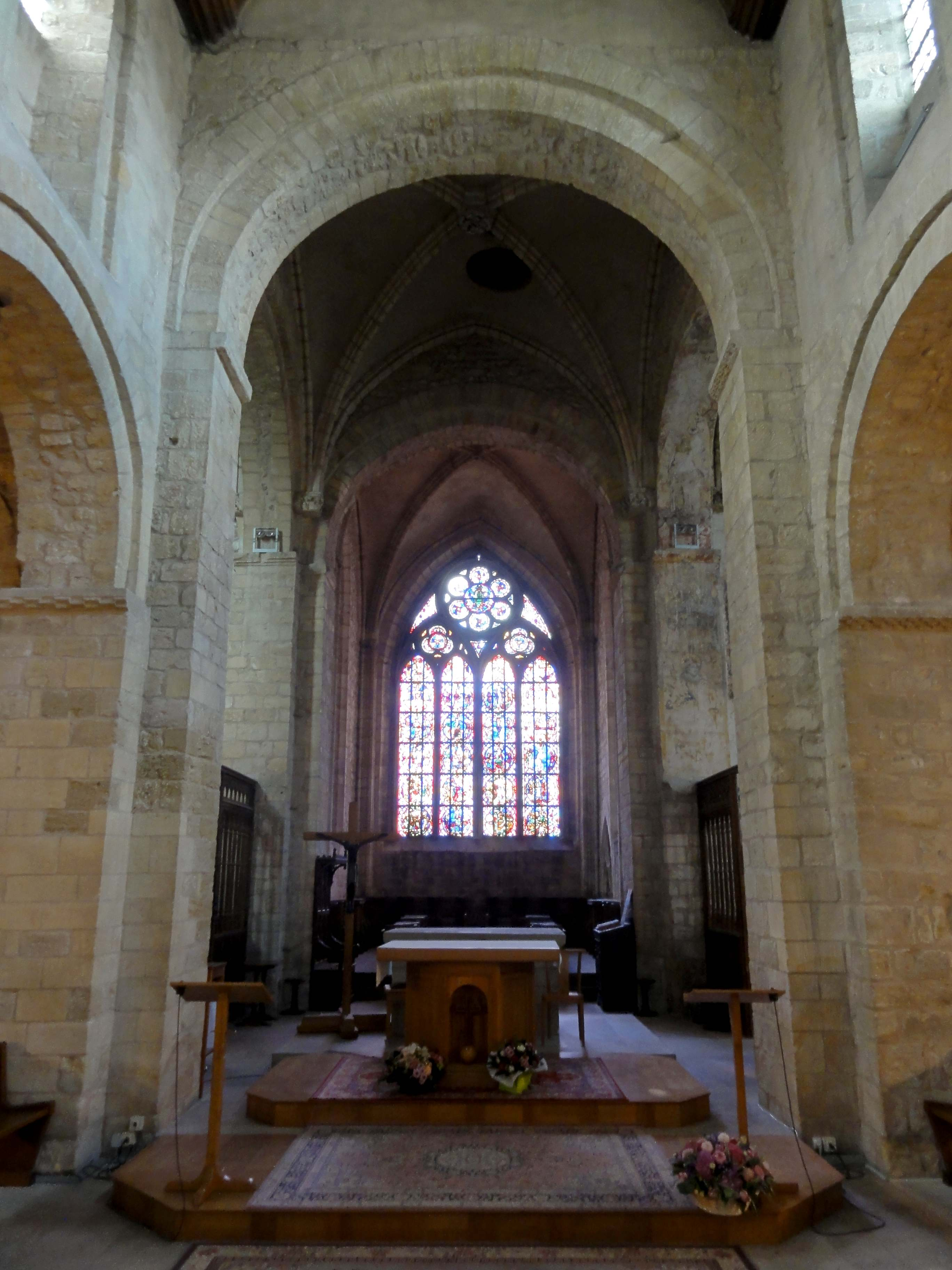 Intérieur de l'église - voir titre.